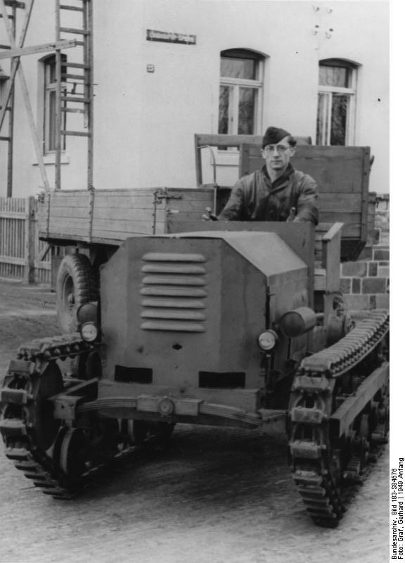 Triptis, Raupenschlepper verläßt Werk ADN-ZB/Illus-Graf SBZ; Anfang 1949 Ein neuer Raupenschlepper verlässt das Werk. Die VVB Fahrzeugwerke Triptis stellen im Rahmen des 2- Jahresplanes 100 Traktoren her. 3095-49